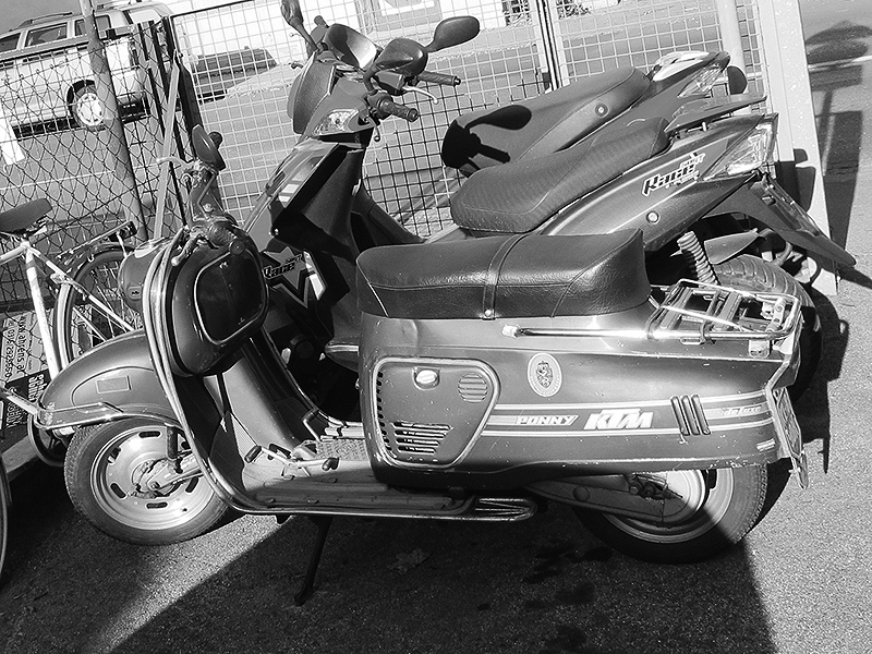 KTM Ponny, in Graz (Austria) gefunden